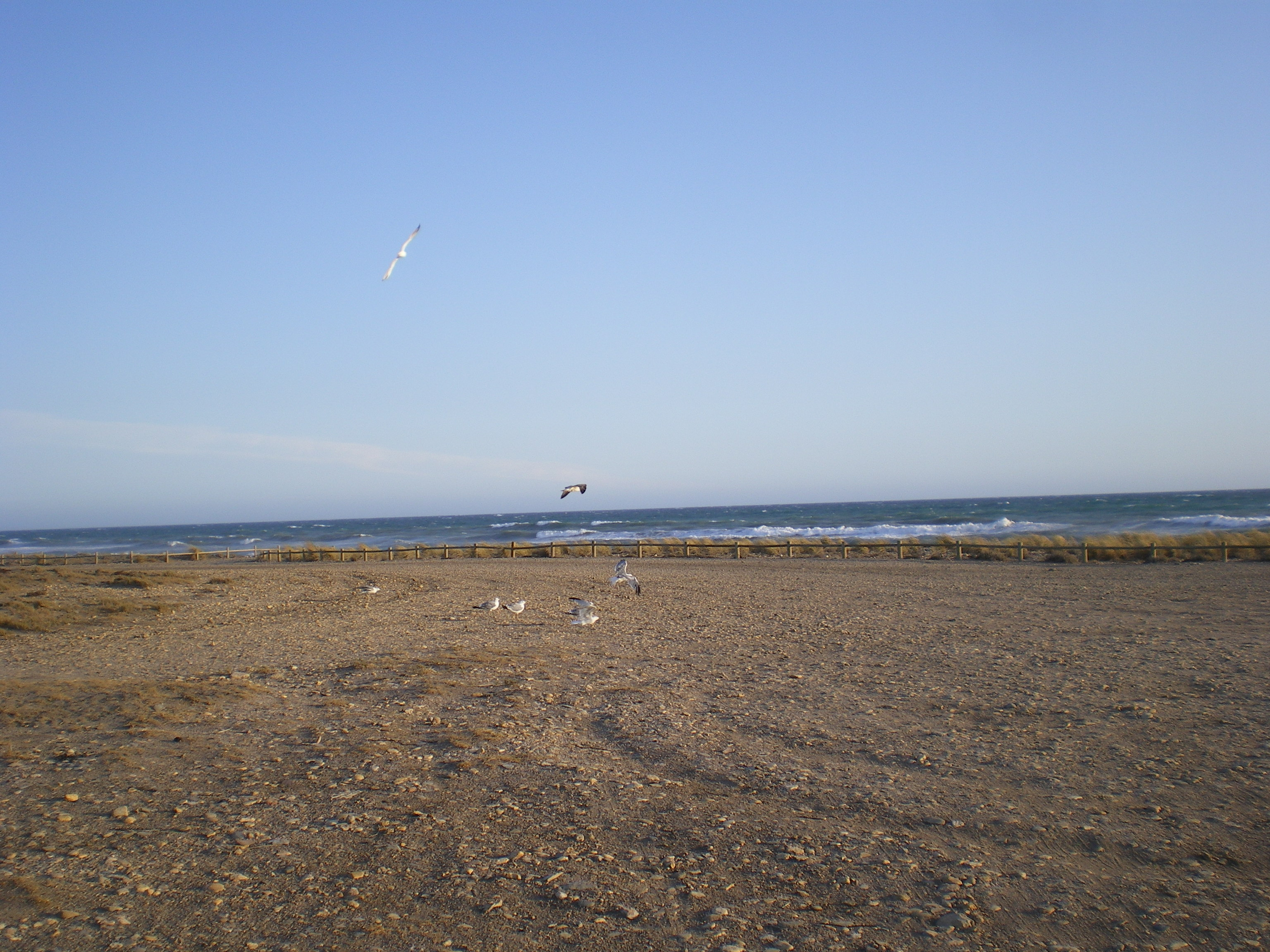 Fotografía de la playa de Torregarcía, Almería, Andalucía, España, con gaviotas.